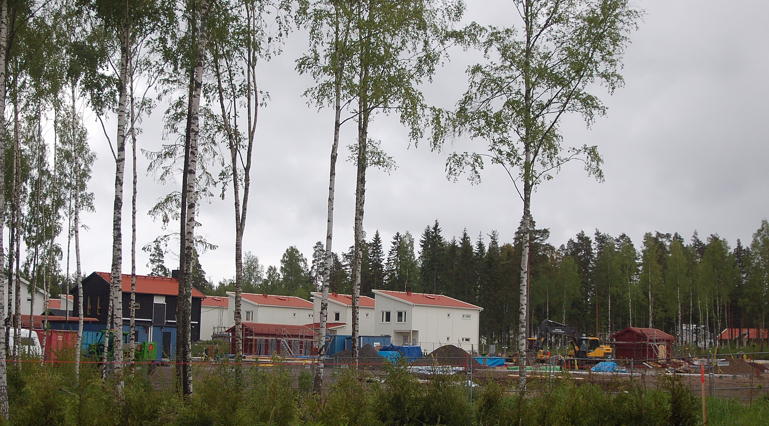 Bärstad är Hammarö kommuns senaste nybyggnadsområde.